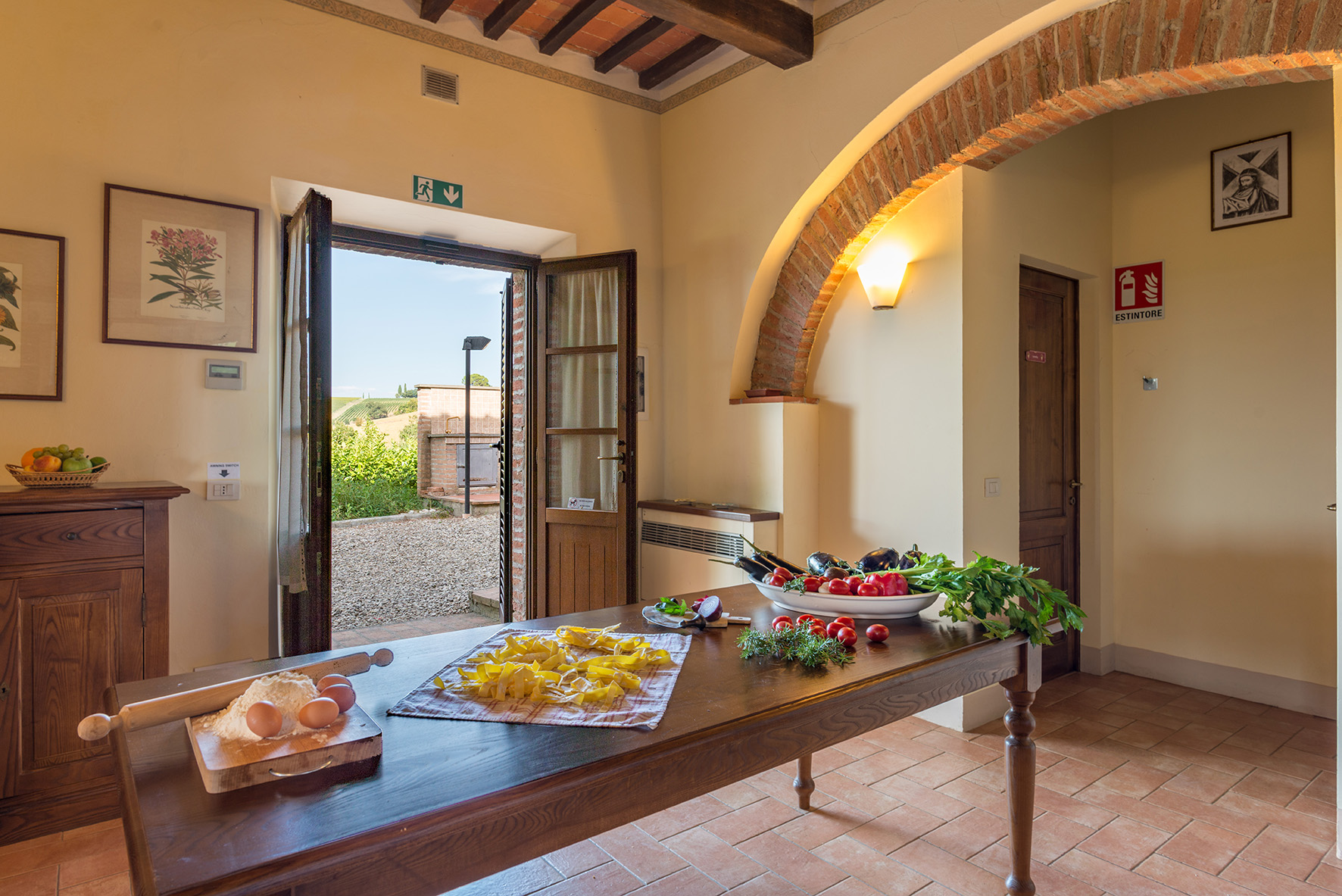 Agriturismo Casa di Bacco (Montepulciano)